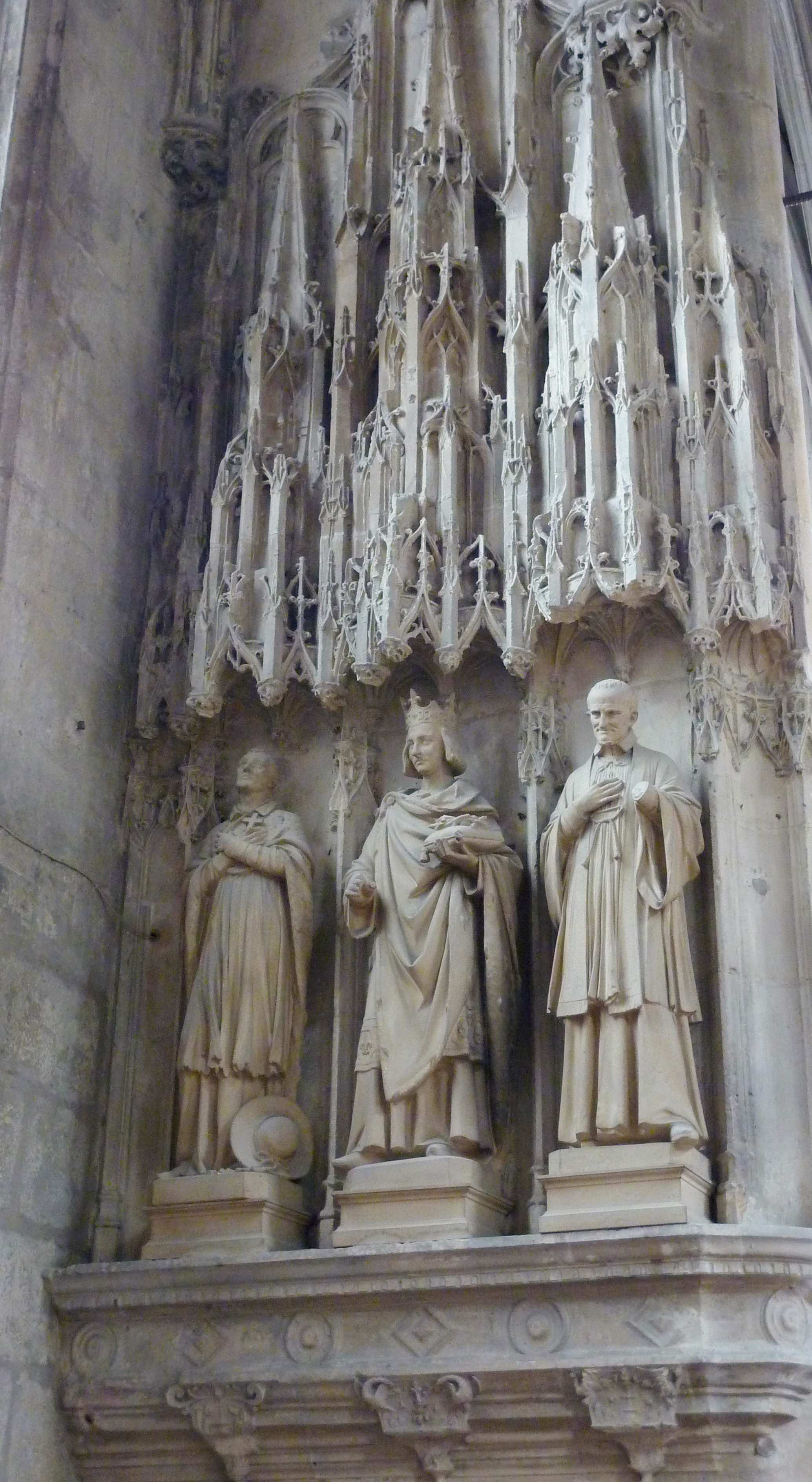 Katholische Pfarrkirche Saint-Aspais in Melun im Département Seine-et-Marne in der Region Île-de-France (Frankreich), gotischer Seitenaltar mit Renaissancedekor